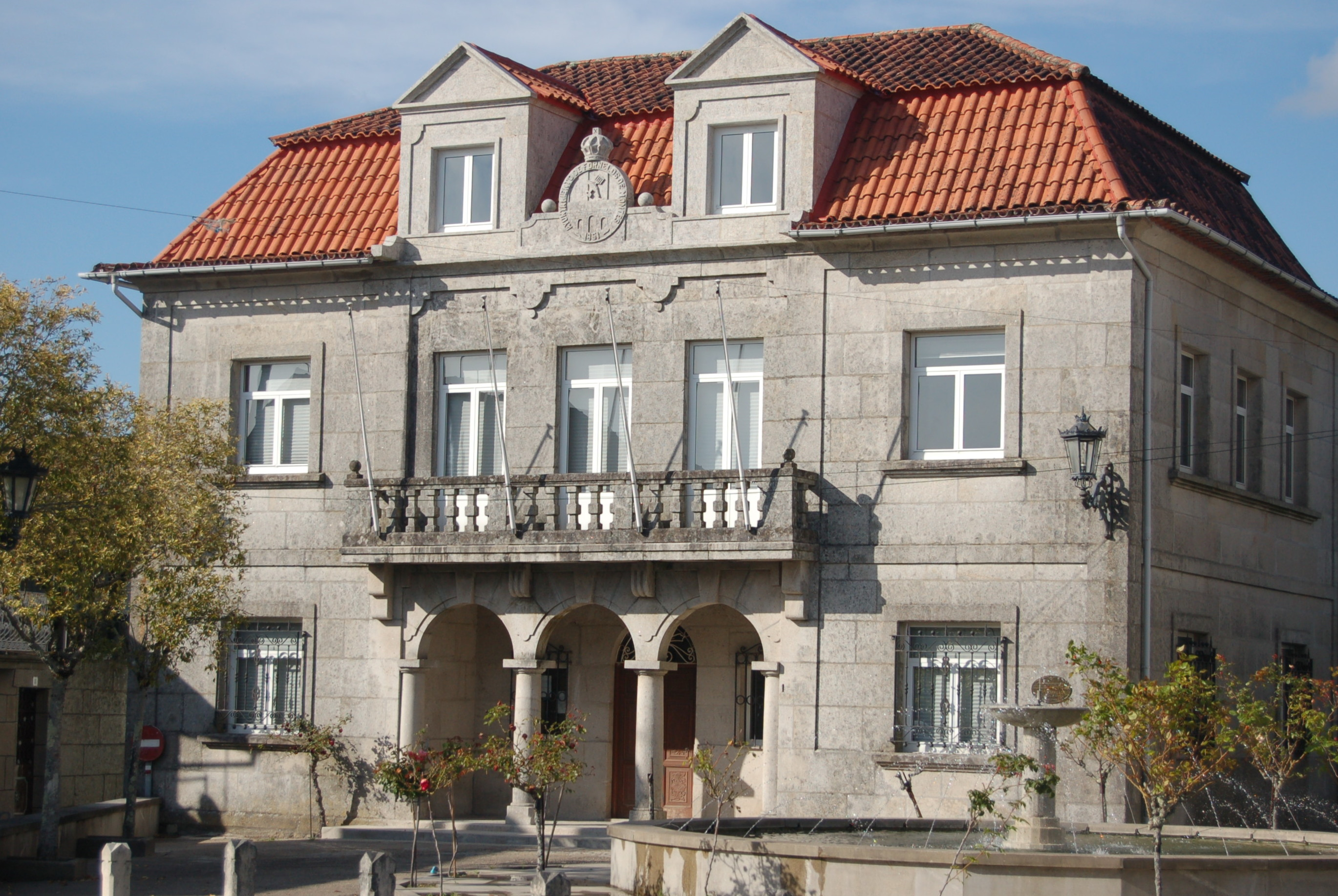 Casa consistorial de Fornelos de Montes